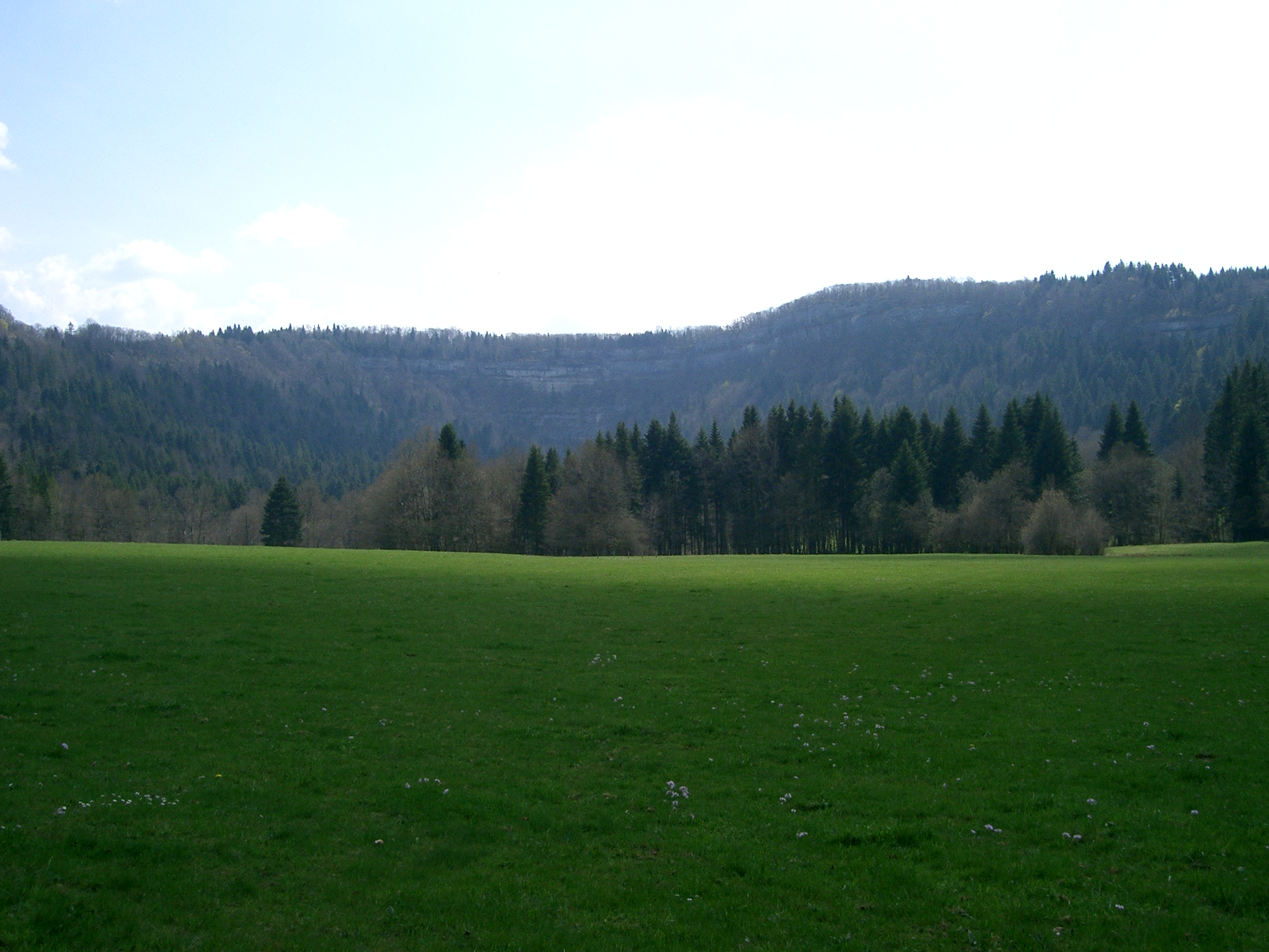 Reculée de Balerne, parcourue par la rivière du même nom et occupée pendant des siècles (XIIe - XVIIIe) par une abbaye située derrière les sapins du second plan (disparue aujourd'hui)